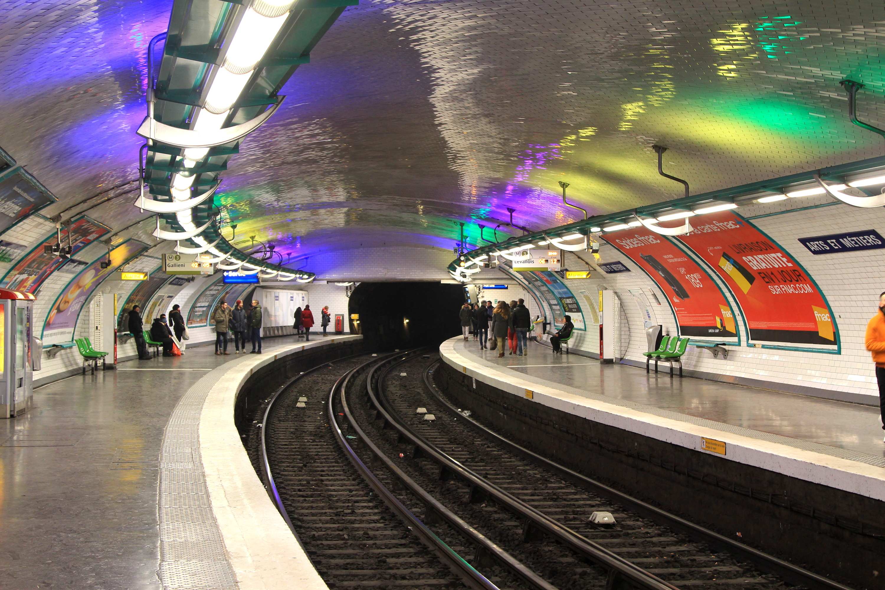 Quais de la station Arts et métiers de la ligne 3 du métro de Paris, vus en direction de Levallois.